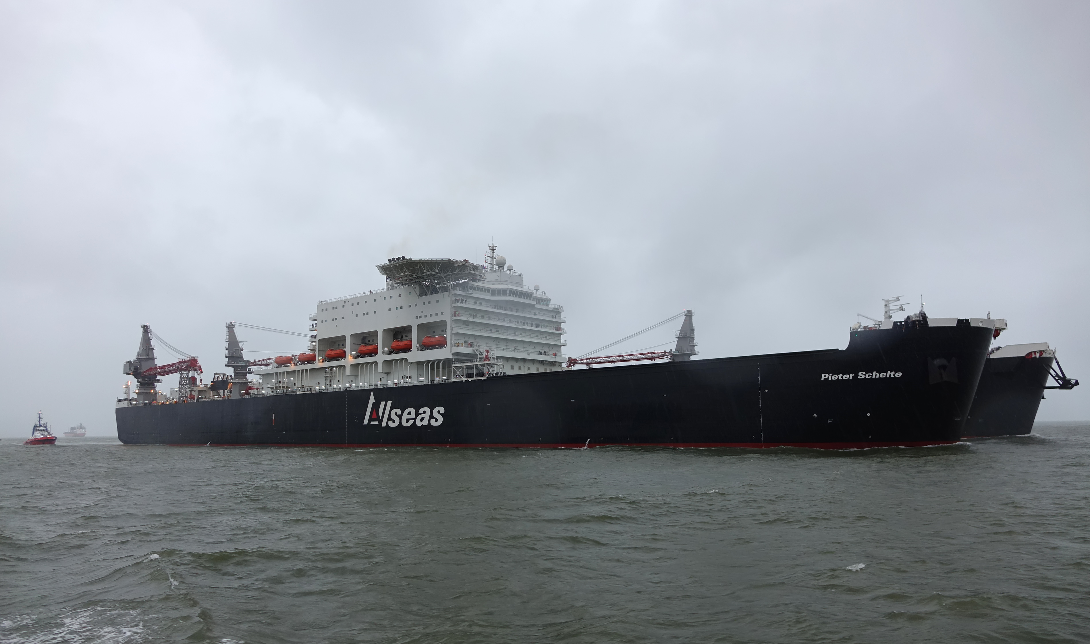 Maasmond 8-1-2015